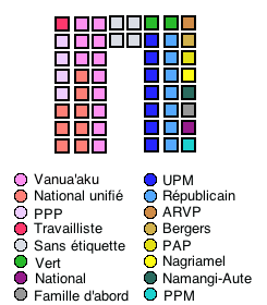 Composition du Parlement du Vanuatu suite aux élections législatives de 2008.